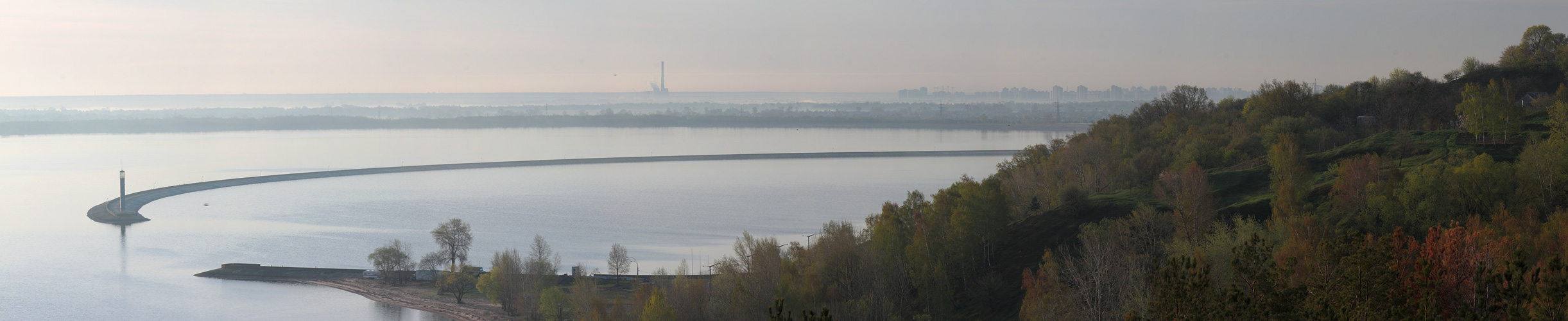 Історичний ландшафт давньоруського м. Вишгорода, Вишгород, у межах Вишгородської гори, від підніжжя схилів Київського плато на півдні до північної межі останця